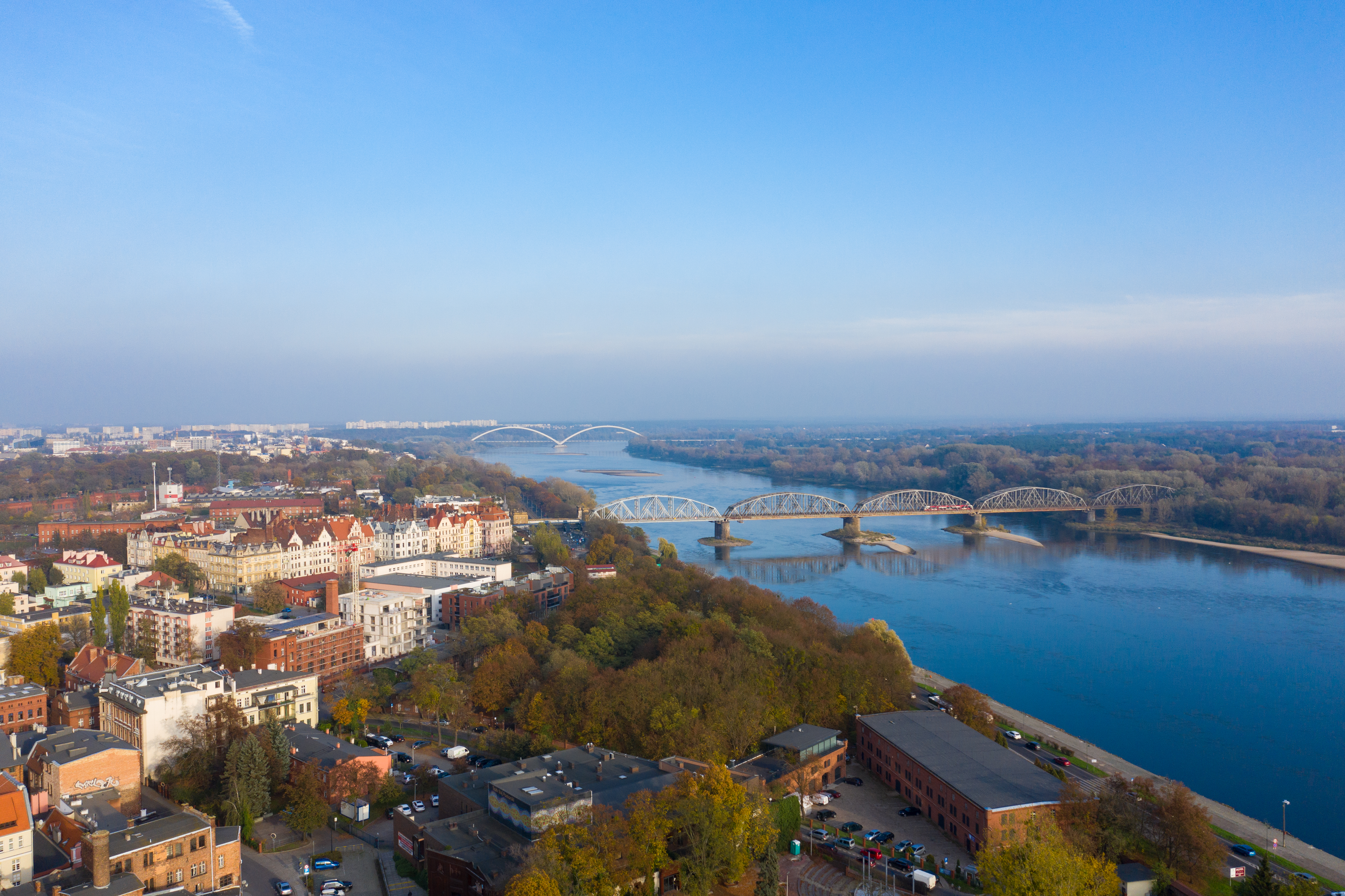 Blick über die Blick über Toruńer Innenstadt, Okt. 2019